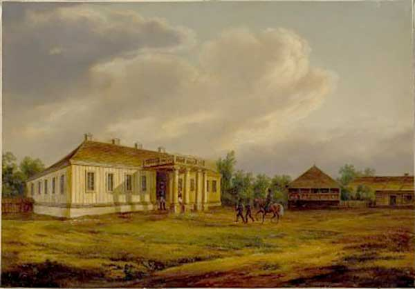 Беларуская (тарашкевіца): Камень (Kamień), сядзіба Пакашаў (Pakaš)